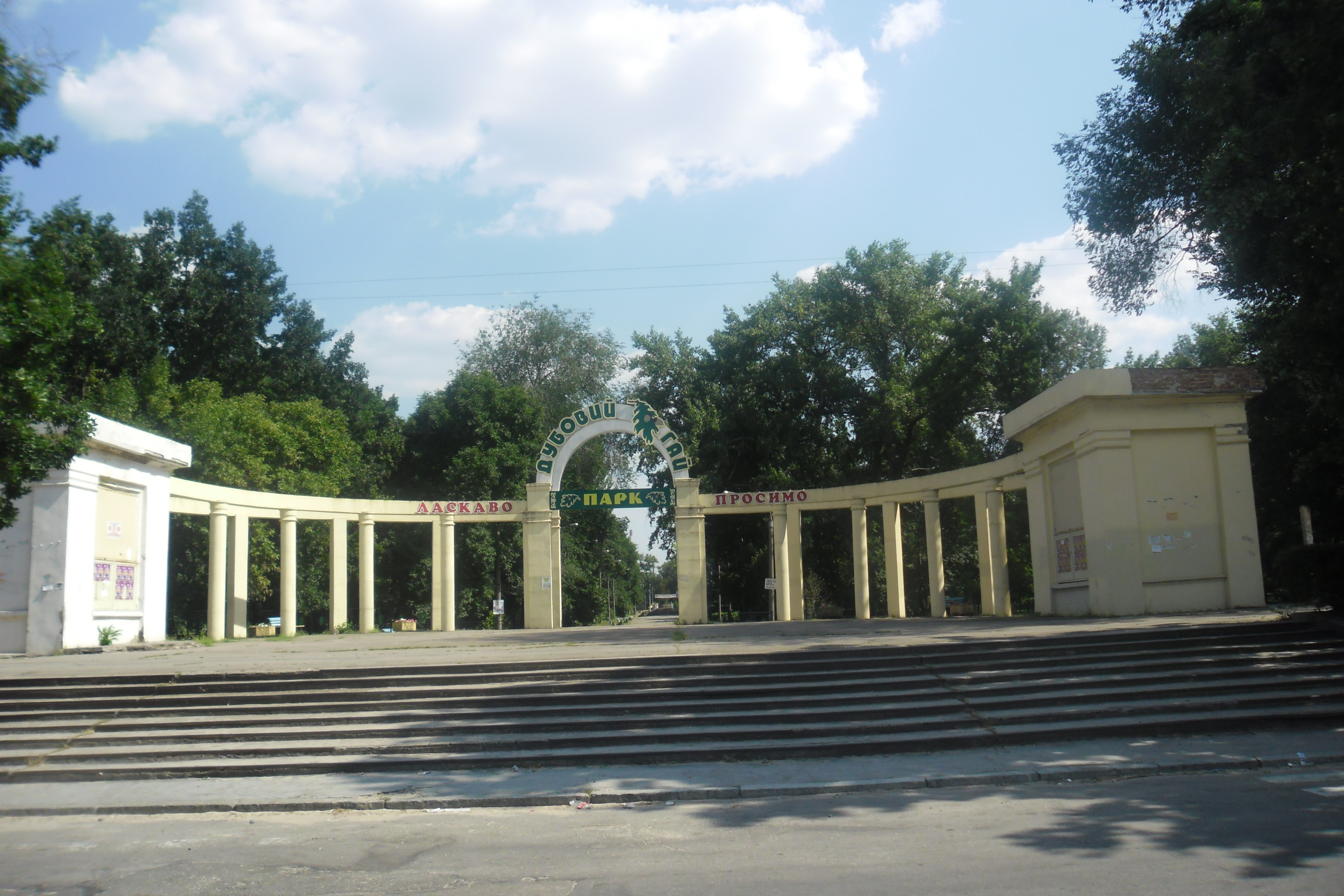 Фото